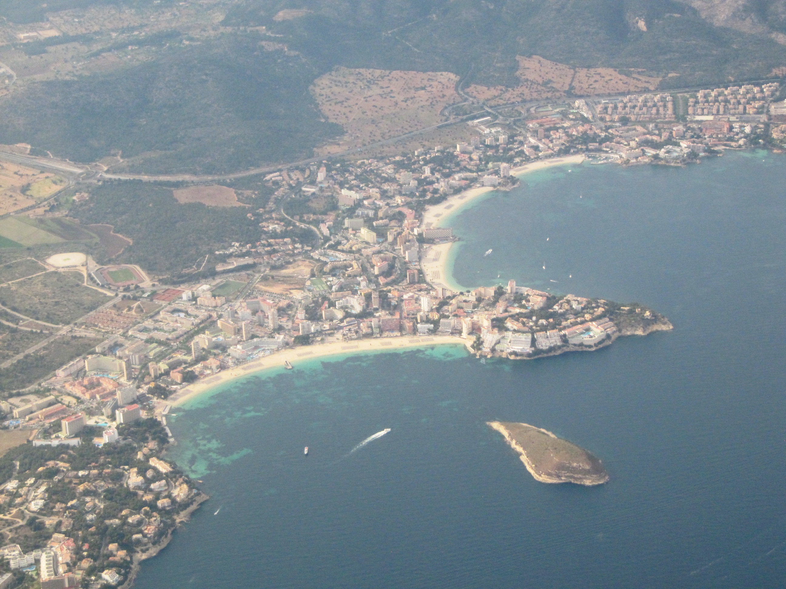 Magaluf, Torrenova, Sa Porrassa